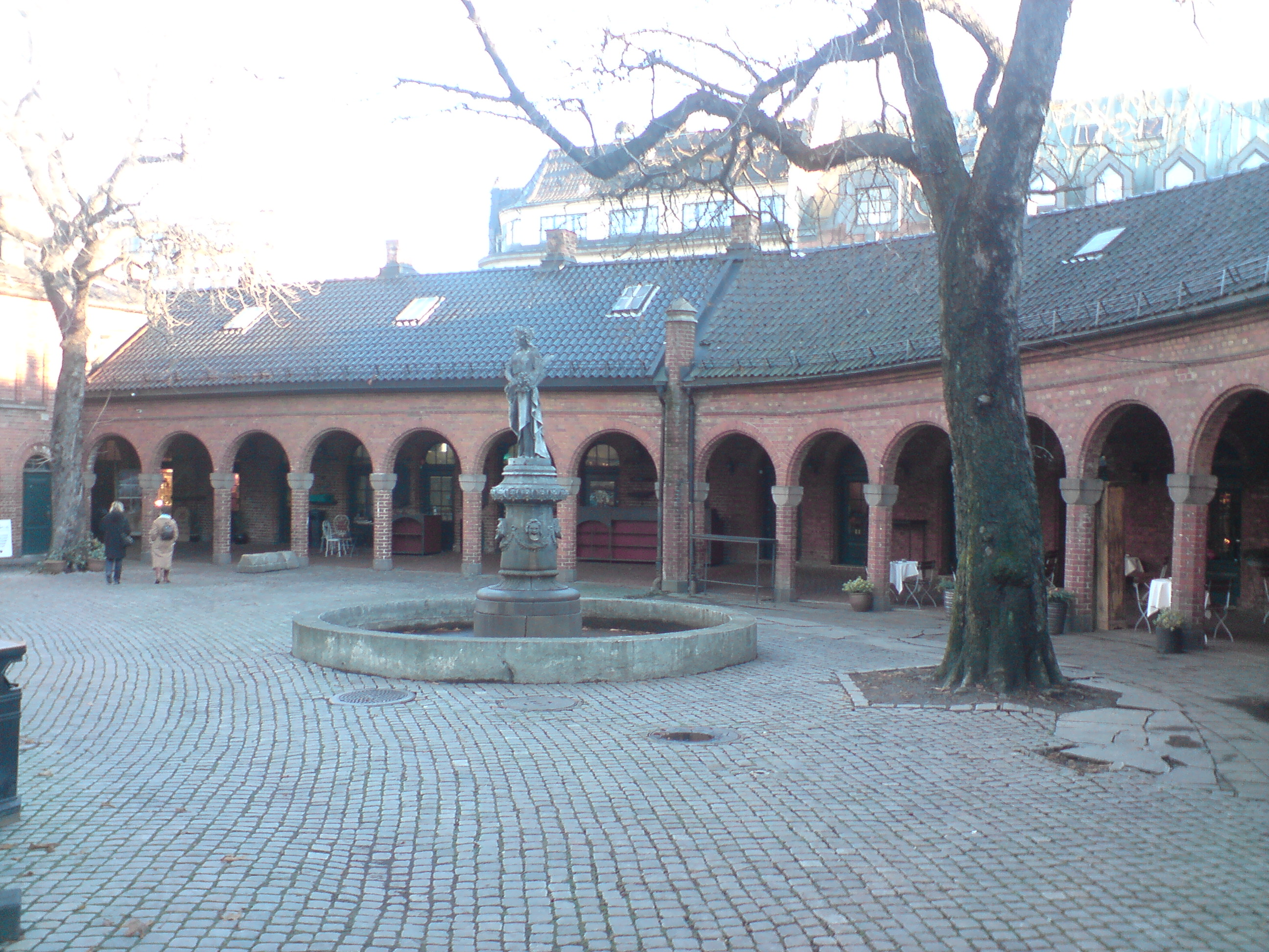 Innsiden av Basarene